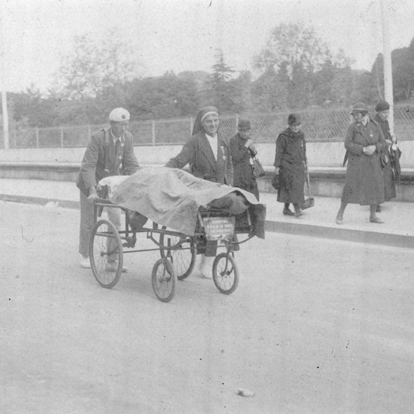 Juin 1933, Marie Louise Gheerbrant, infirmière artésienne de l'hospitalité de Lourdes, accompagnant un malade en pélérinage.